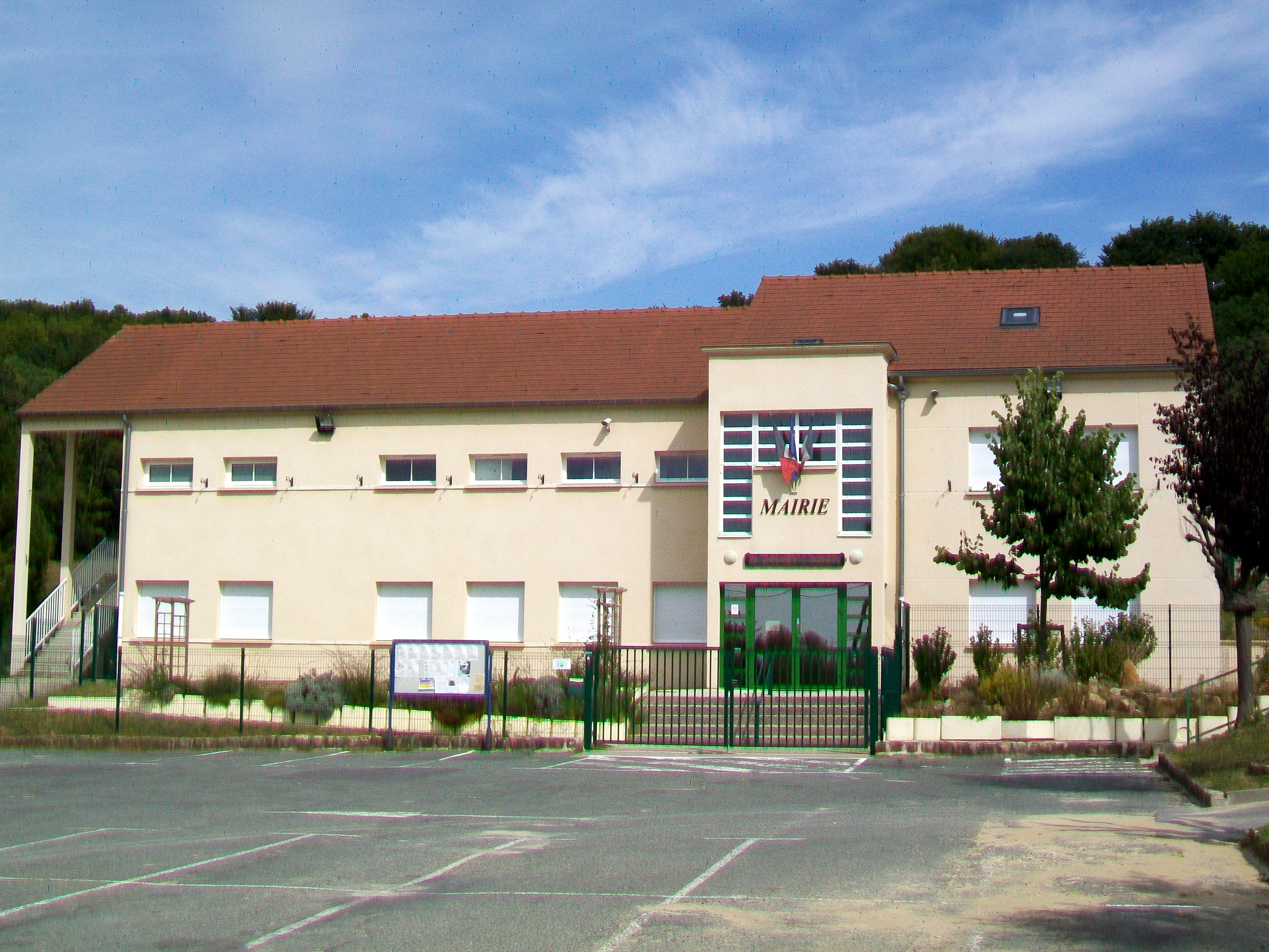 La nouvelle mairie.